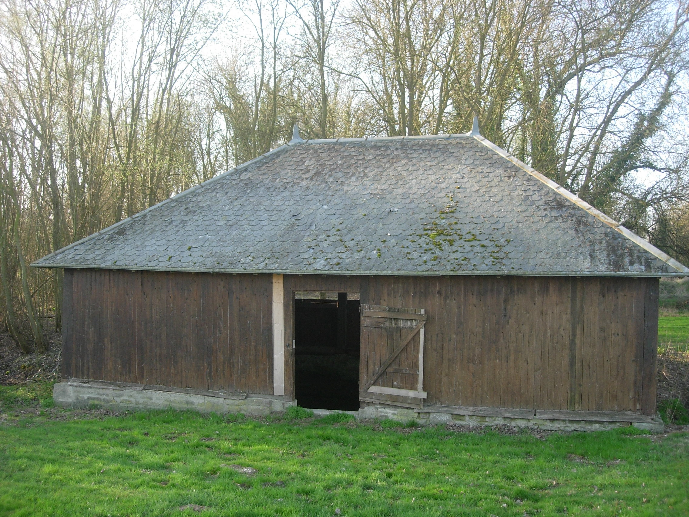 Lavoir de Dierrey-Saint-Julien (Aube)